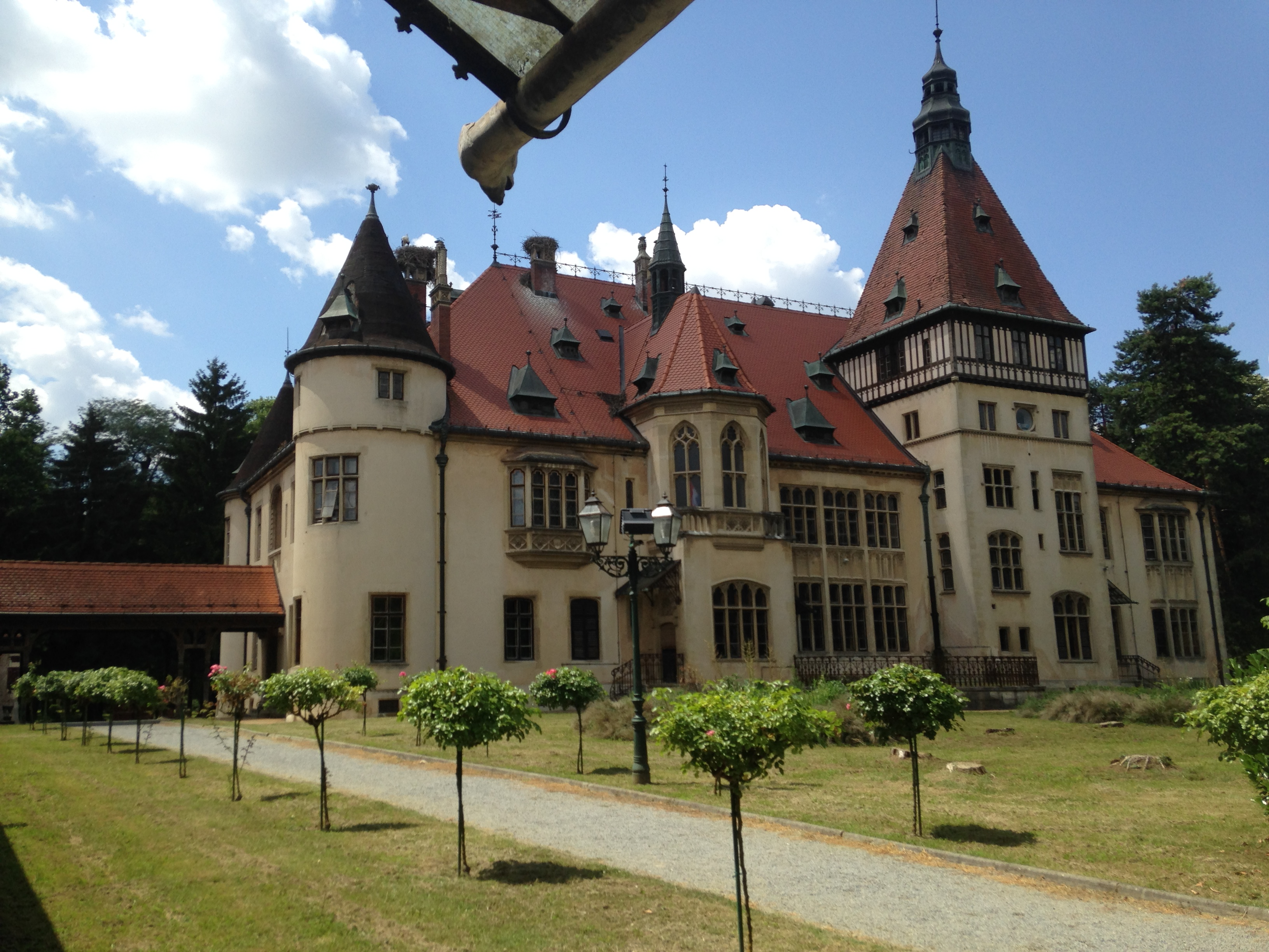 prelijepi dvorac